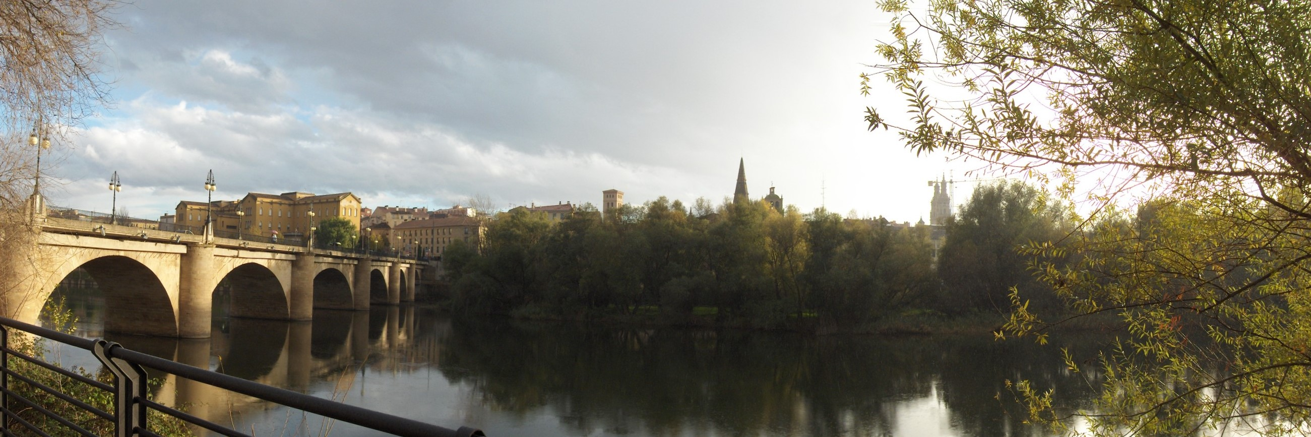 Vista del ebro desde la casa de las ciencias